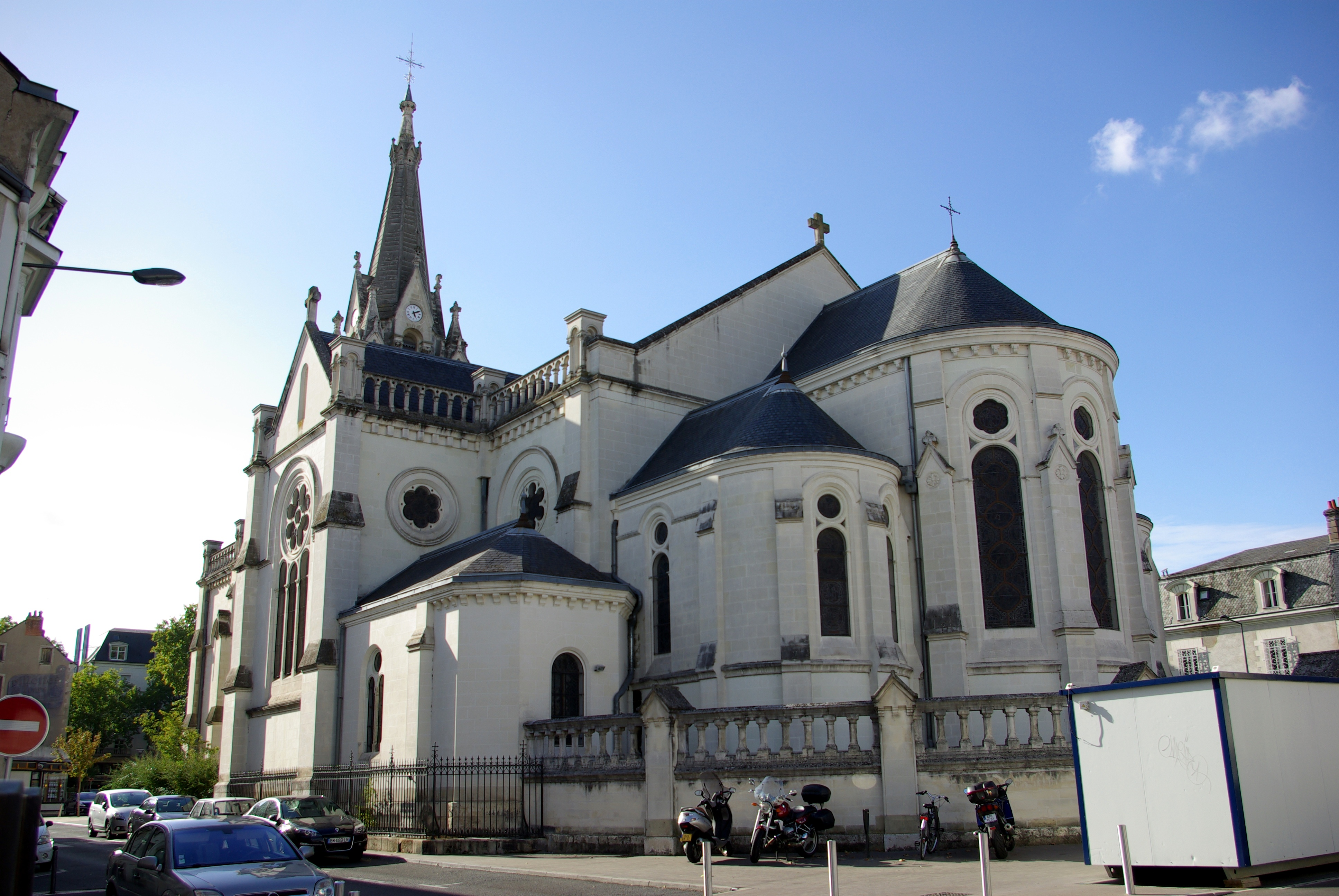 Église Saint-Étienne de Tours, Indre-et-Loire.